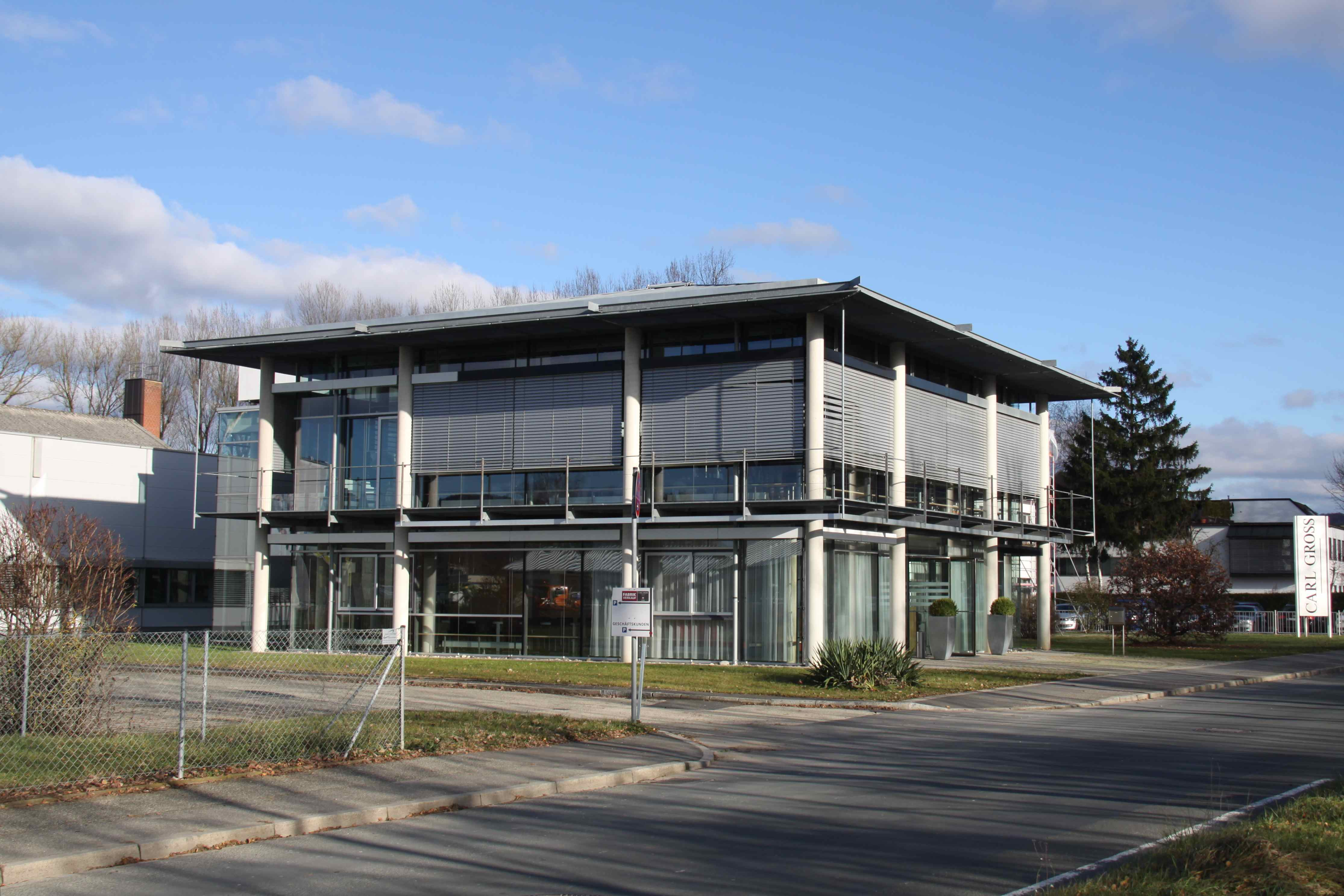 Verwaltung Carl Gross